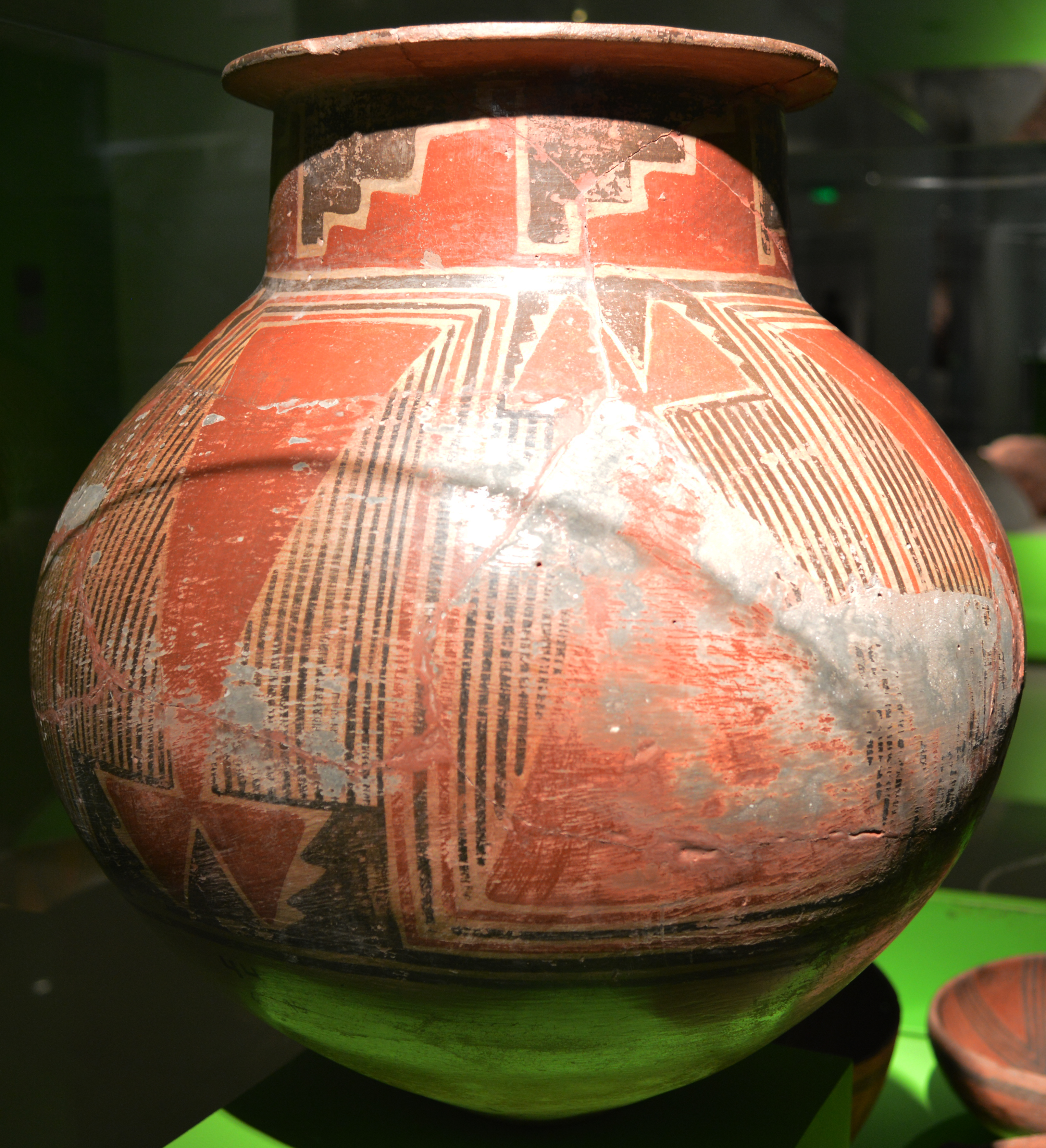 Alfarería indígena.